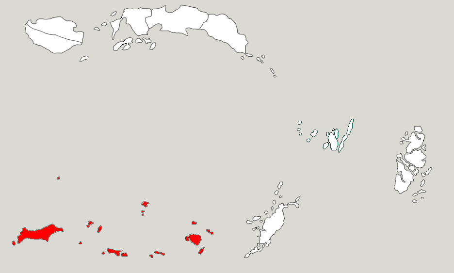 Округ Південно-Західне Малуку